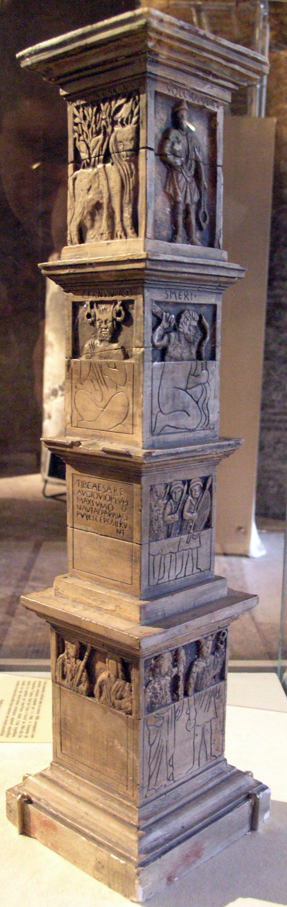 Maquette du Piliers des Nautes